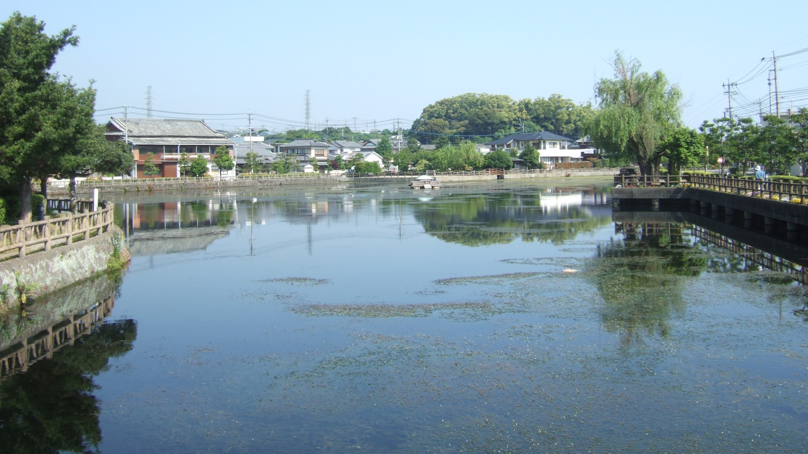 白土湖（長崎県島原市）